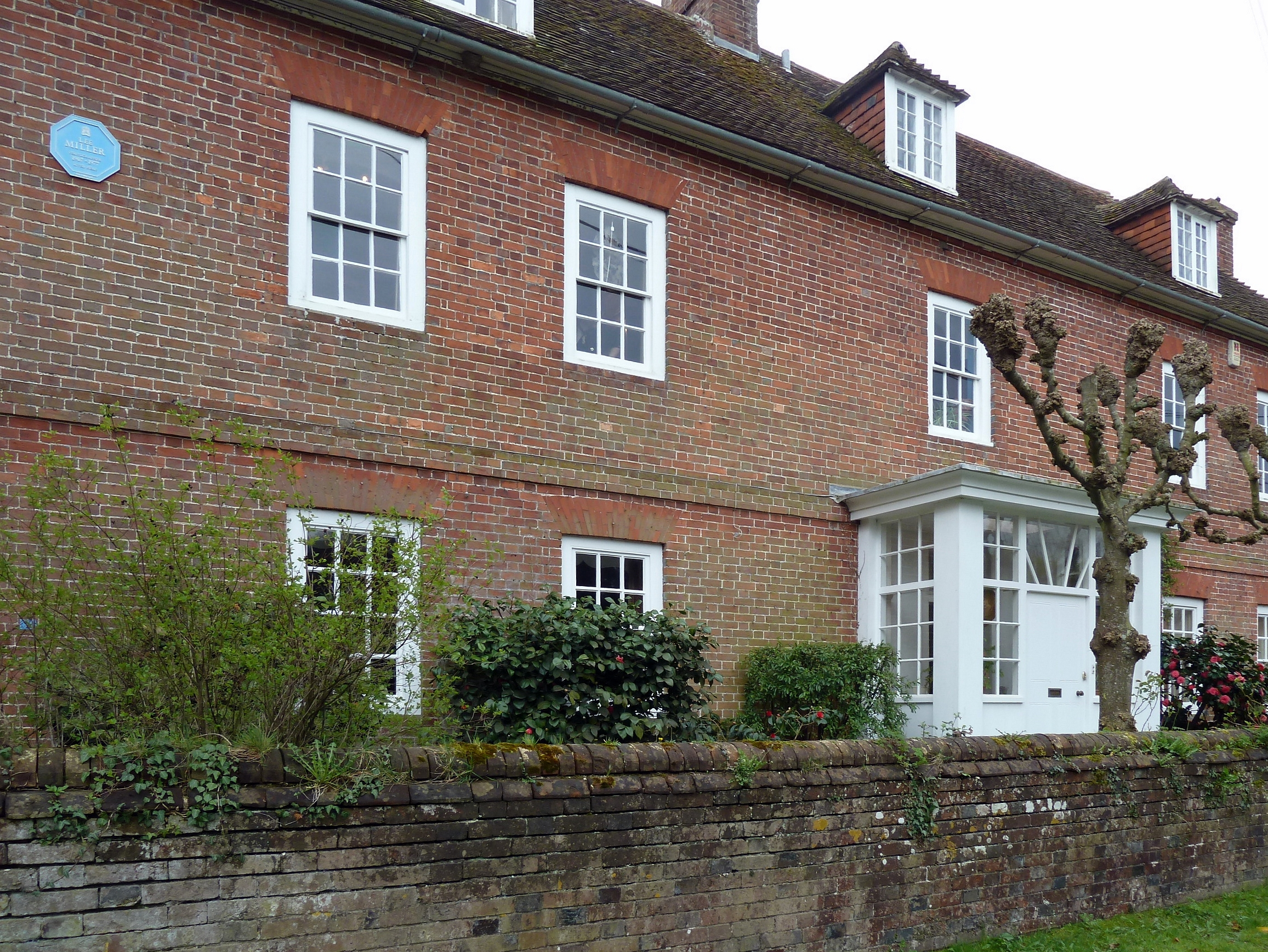 Lee Miller